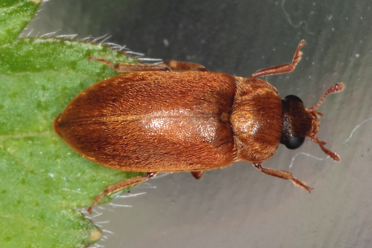 Himbeerkäfer_(Byturus_ochraceus_(SCRIBA) ehemals Byturus aestivus), Sachsen, Laubwald, 4mm